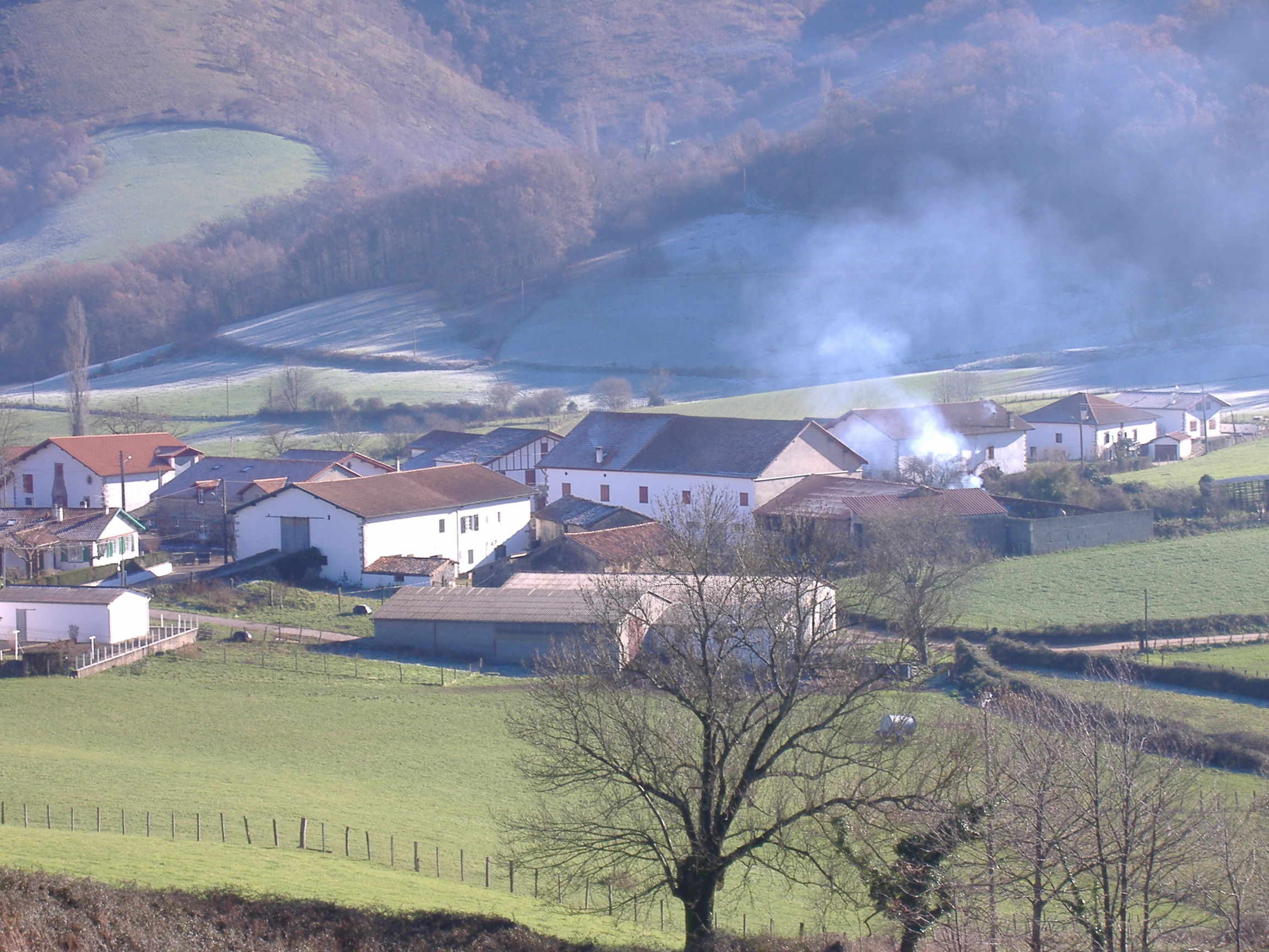 Quartier Ahize